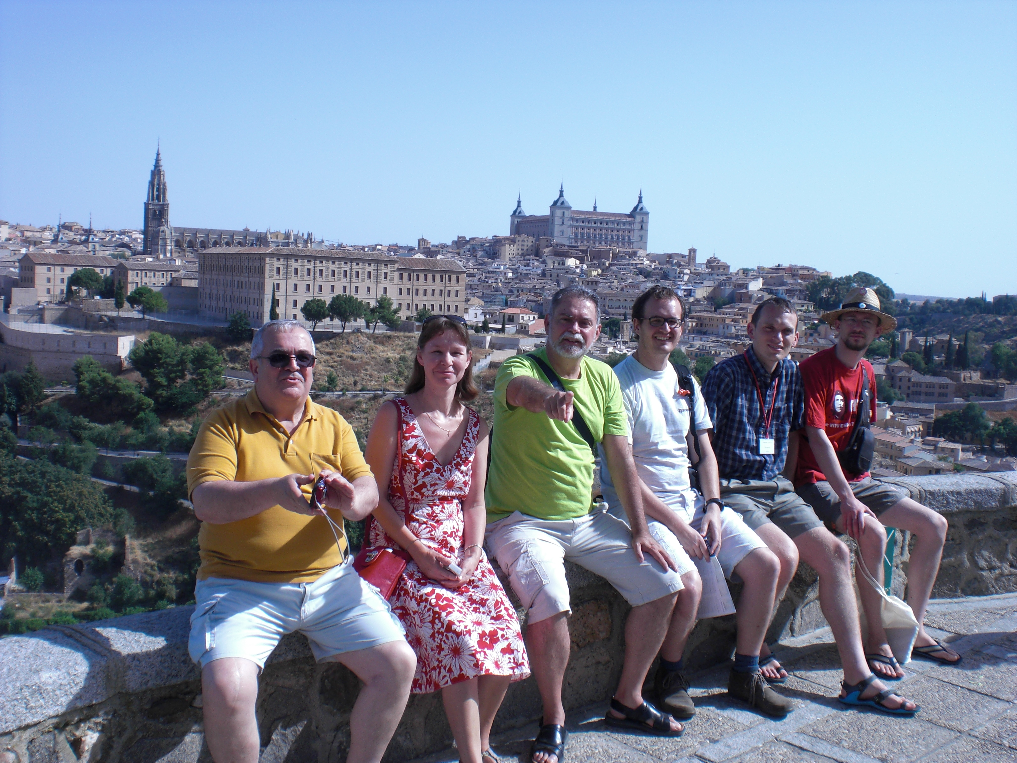 rigardejo